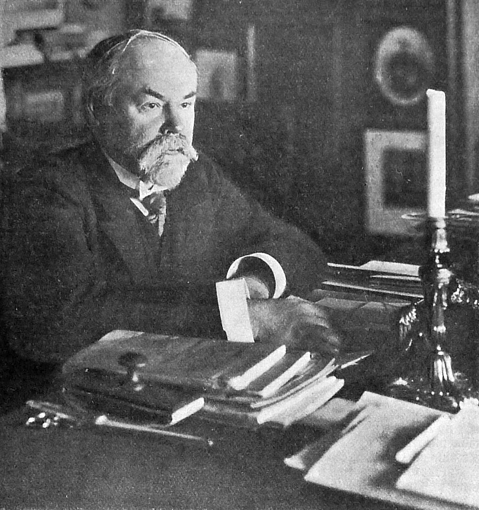 Щукин, Пётр Ильич - известный коллекционер